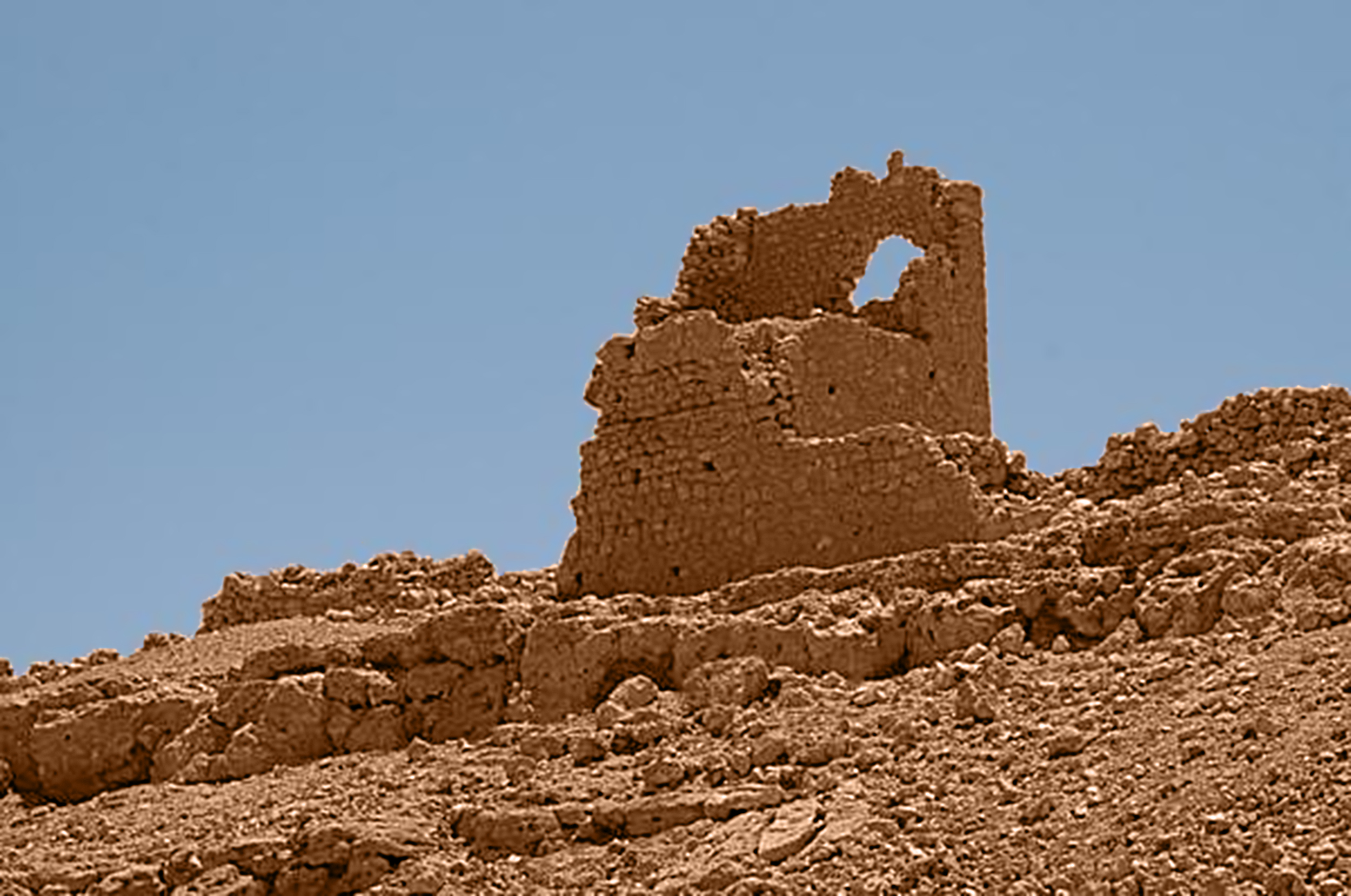 Kastell Gheriat el-Garbia - Zwischenturm 2, Photo von Außen auf den Turm mit Resten der Umfassungsmauer